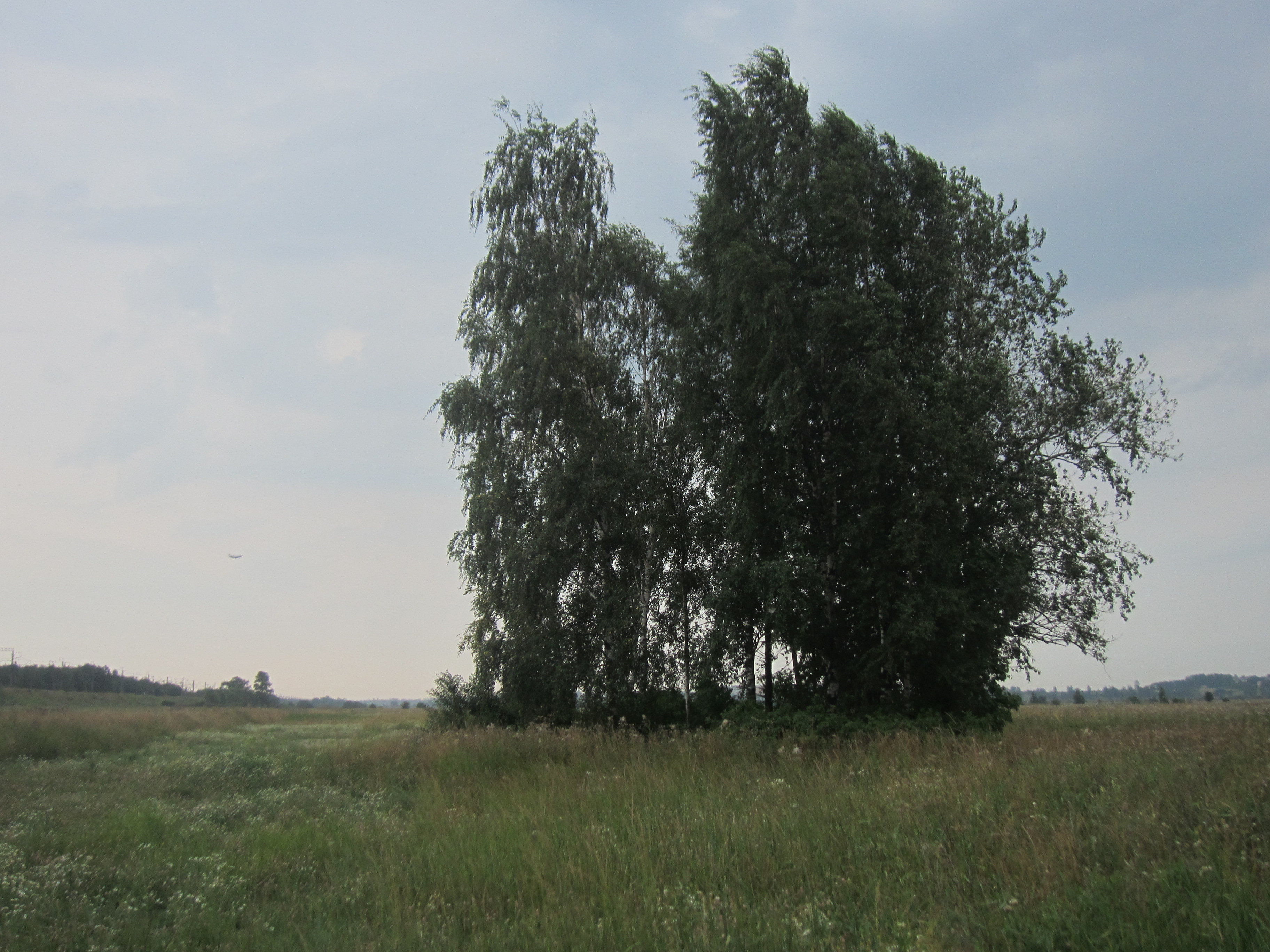 Небольшая роща, созданная на месте катастрофы Ил-18 (борт CCCP-75559) в районе Ленинграда 27 апреля 1974 года. Вид с северной стороны. На заднем плане виден заходящий на посадку самолёт Як-42.